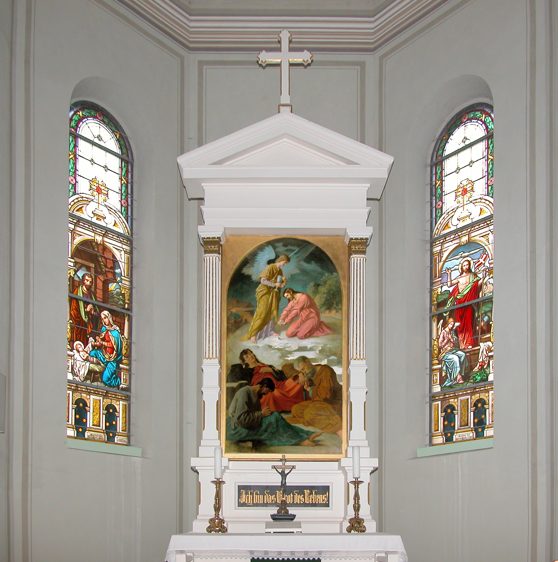 16.04.2010 04749 Zschochau (Ostrau), An der Kirche (GMP: 51.197480,13.196639): Die Dorfkirche wurde unter Leitung von Baumeister Grellmann aus Mügeln im Jahre 1866 nach einem Brand erneut aufgebaut. Bernhard Albert Freiherr von Fritsch, der Kirchenpatron, stiftete den Altar. Das Altarbild schuf Ludwig Nieper aus Leipzig. Es zeigt, wie Christus am Ölberg von einem Engel den Kelch des Leidens empfängt. Die farbigen Bleiverglasungen im Chor lieferte 1906 der Glasmaler Richard Schlein aus Zittau. [DSCN41178&41186.TIF]20100416035MDR.JPG(c)Blobelt